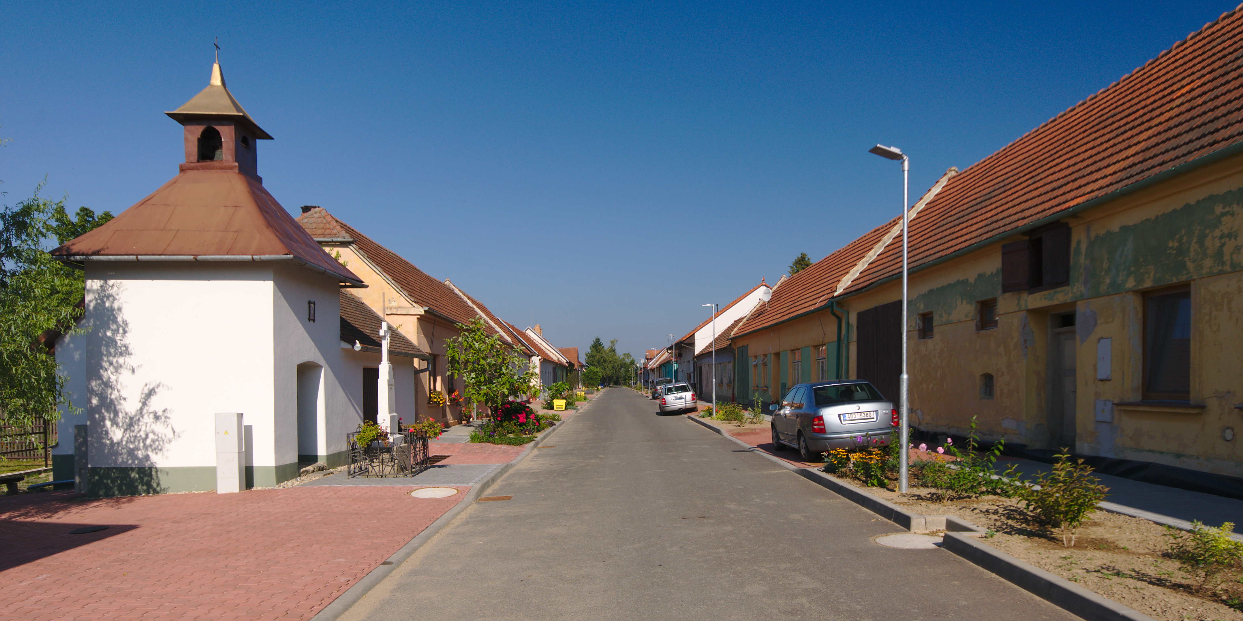 Kaple, Marianín, Lipovec, okres Blansko